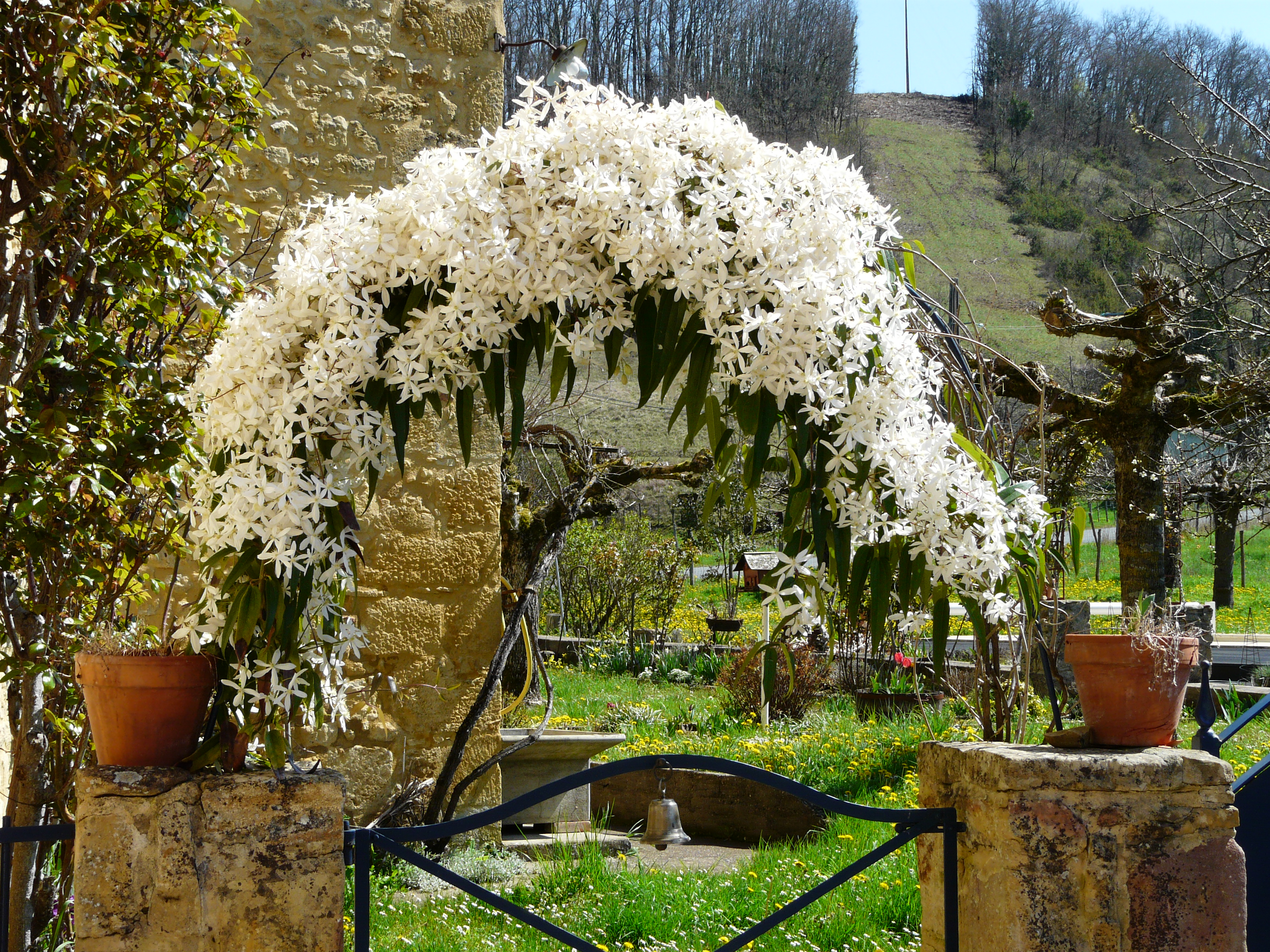 Clematis armandii à Badefols-sur-Dordogne, Dordogne, France.